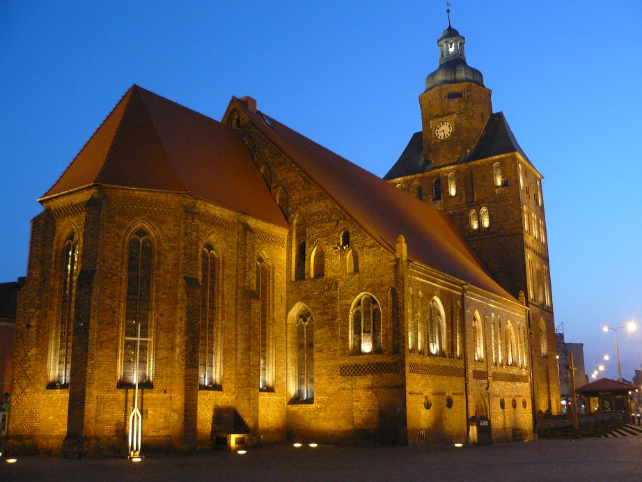 St. Mary's Cathedral in Gorzów Wielkopolski, Poland